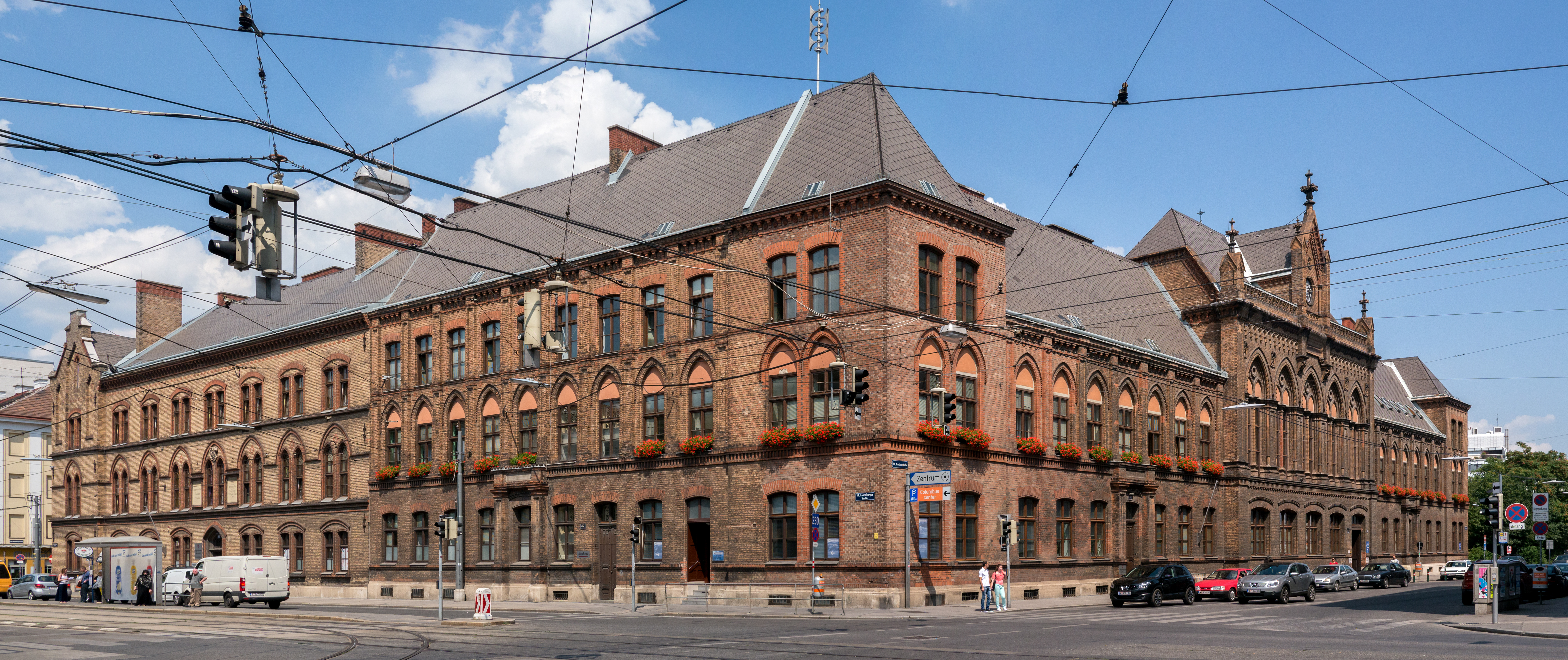 Bezirksamt Favoriten Laxenburger Straße